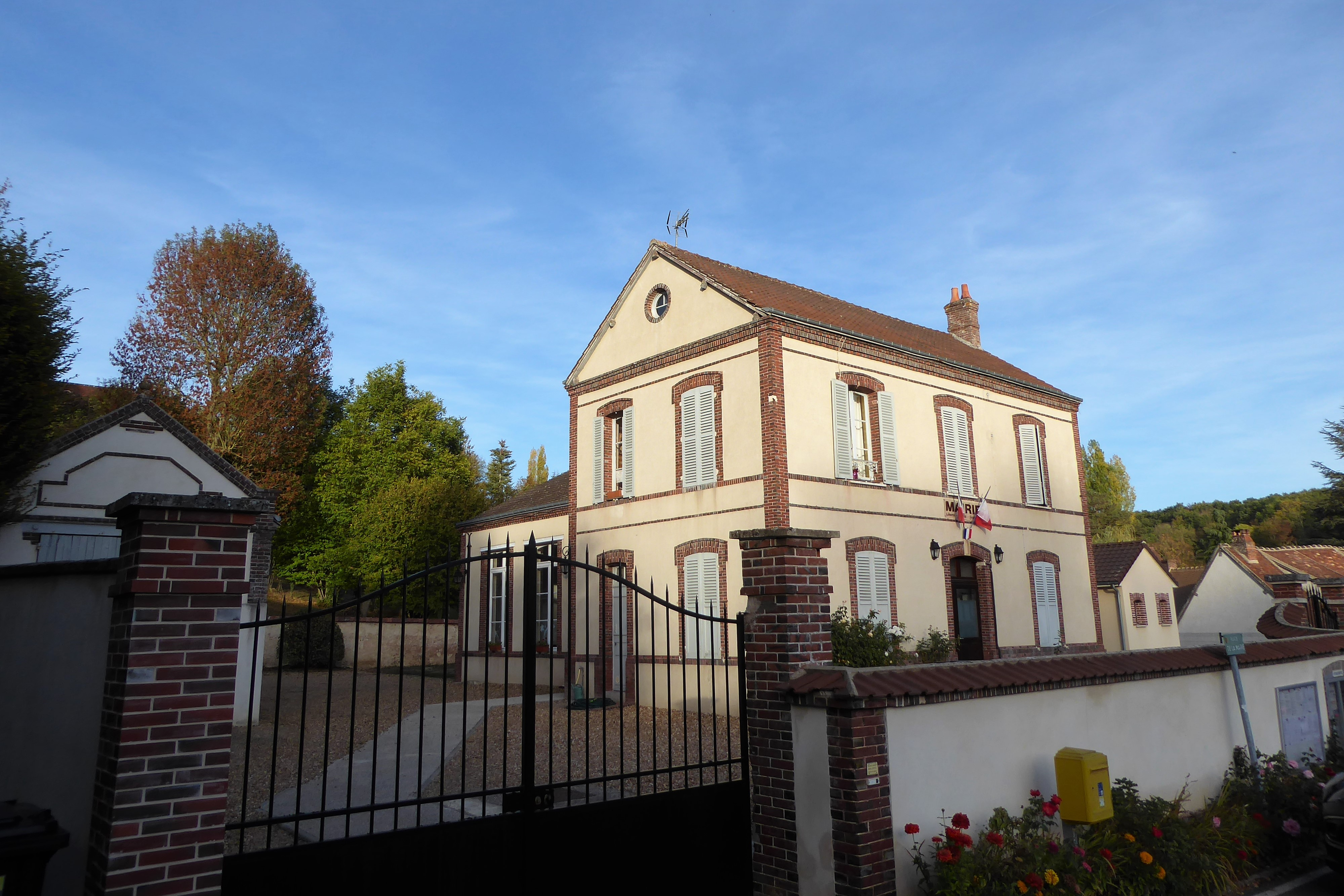 mairie de Bréchamps, Eure-et-Loir, France.